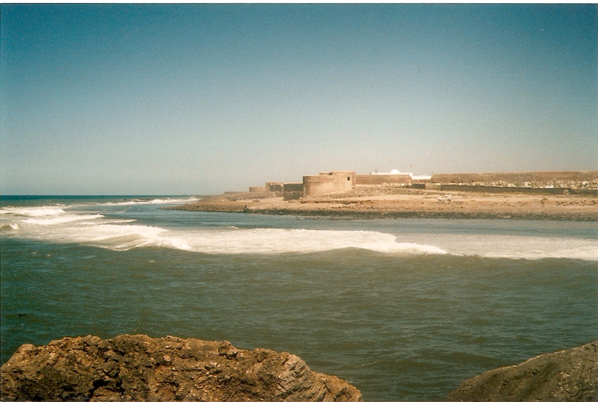 De oude stadsomwalling van Salé, met daarachter (rechts op de foto het kerkhof). Op de rand van de Medina en Sidi Moussa